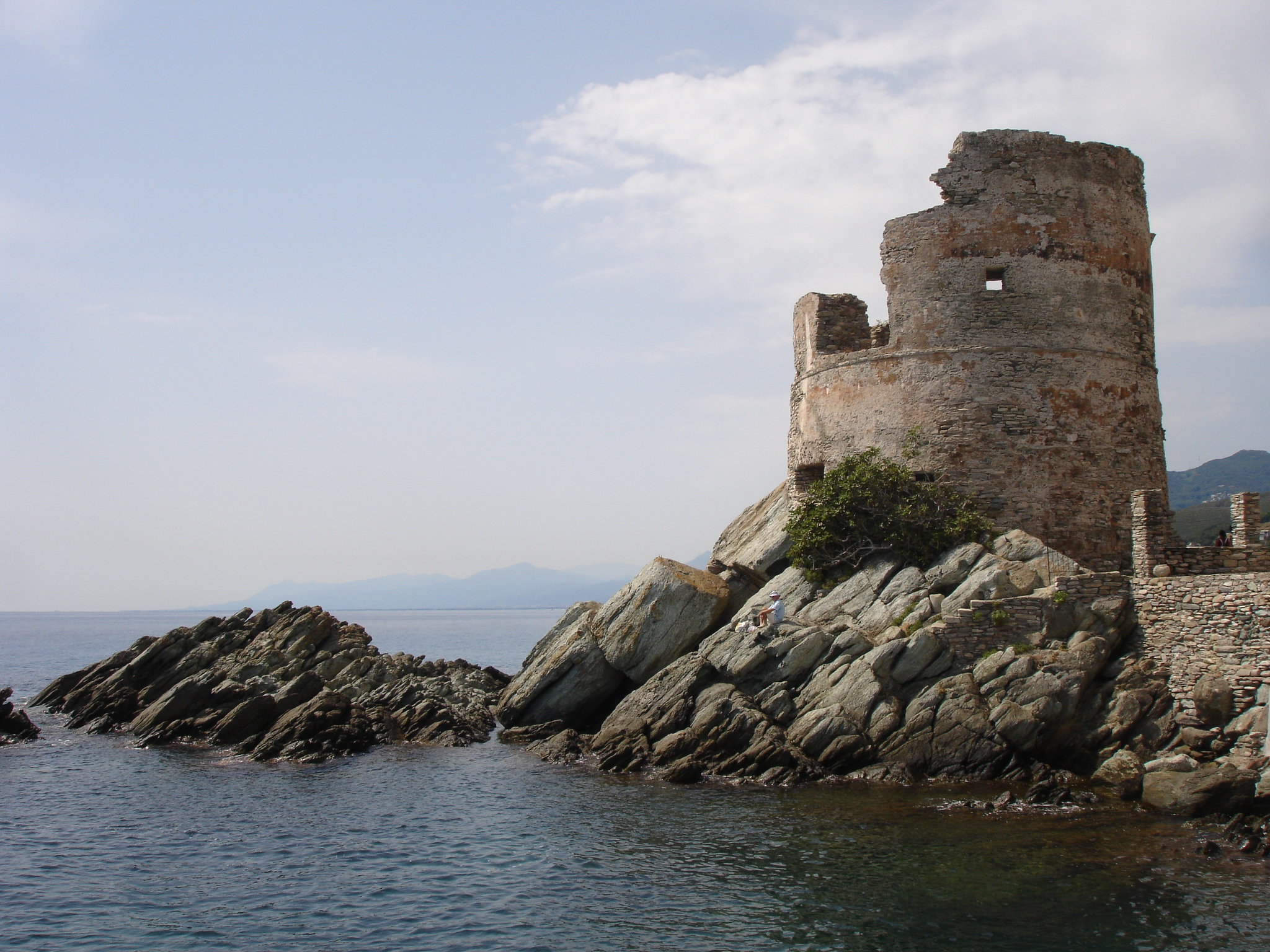 France, Haute-Corse (2B), Brando, Erbalunga, tour génoise